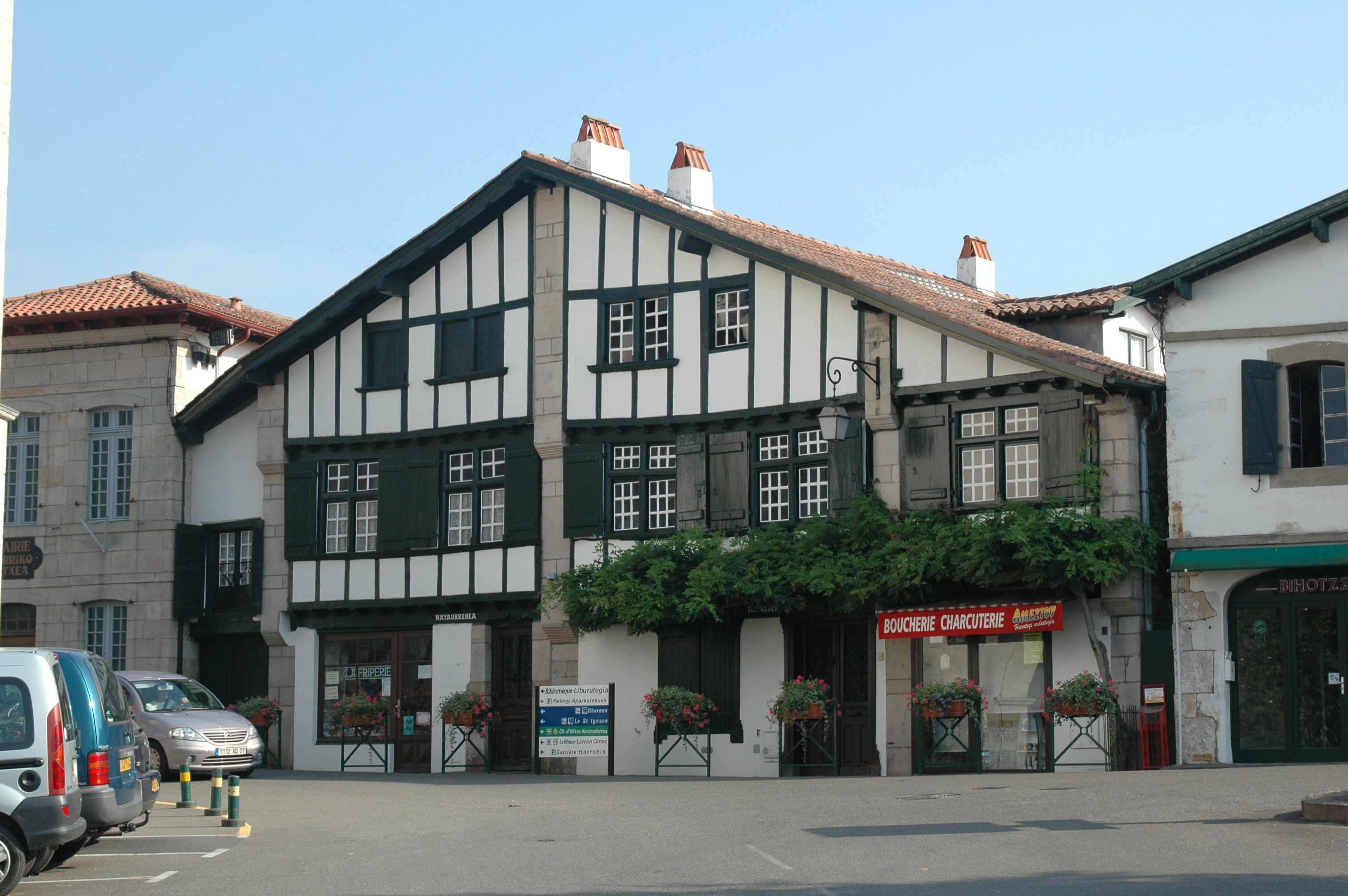 Ascain, Chalet basque. Photo prise le 23/07/06 par Harrieta171